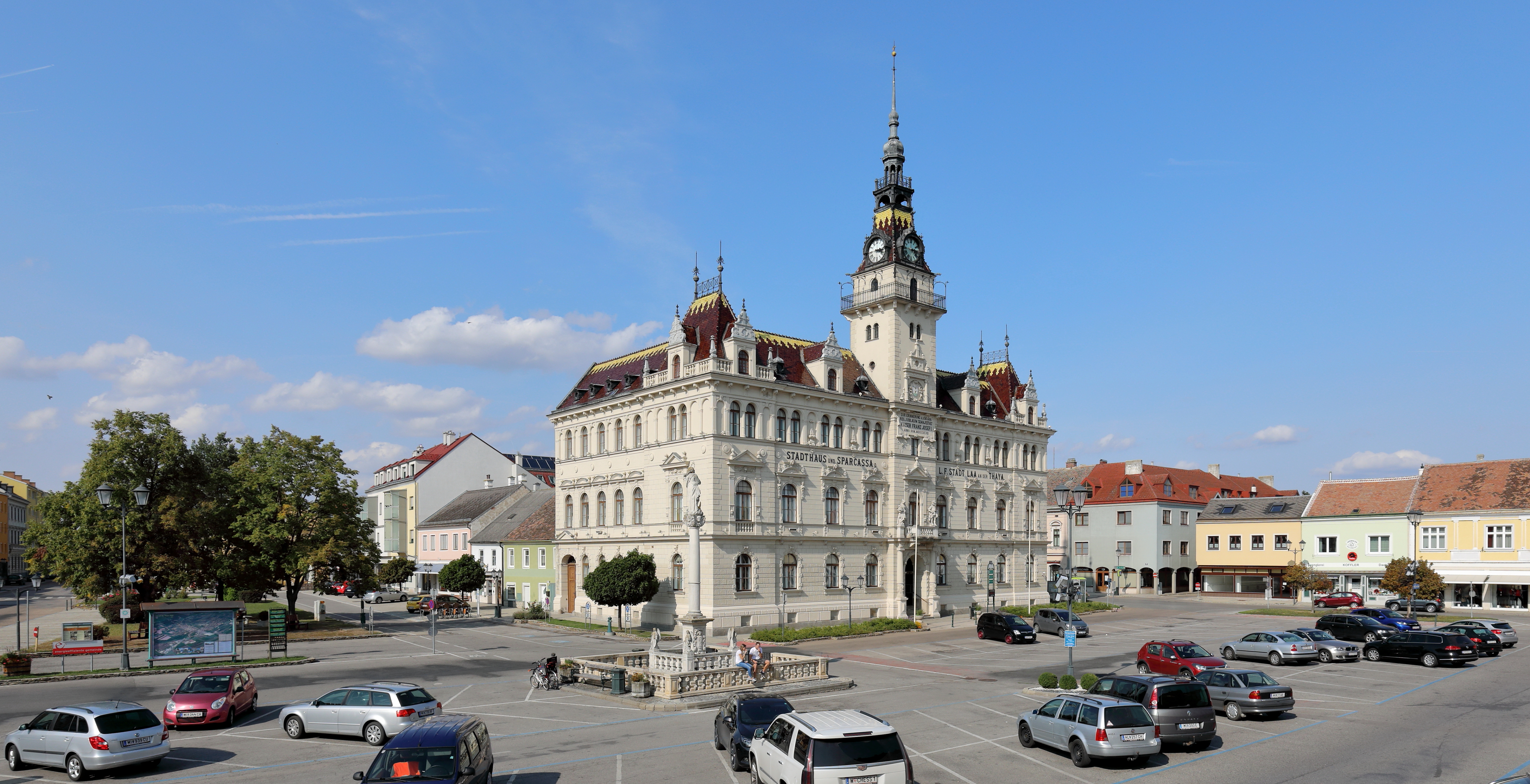 Der Stadtplatz mit dem Rathaus und der Mariensäule in der niederösterreichischen Stadt Laa an der Thaya. Das Rathaus wurde 1898/99 nach Plänen des Architekten Peter Paul Brang errichtet und die Mariensäule ist mit 1680 datiert.